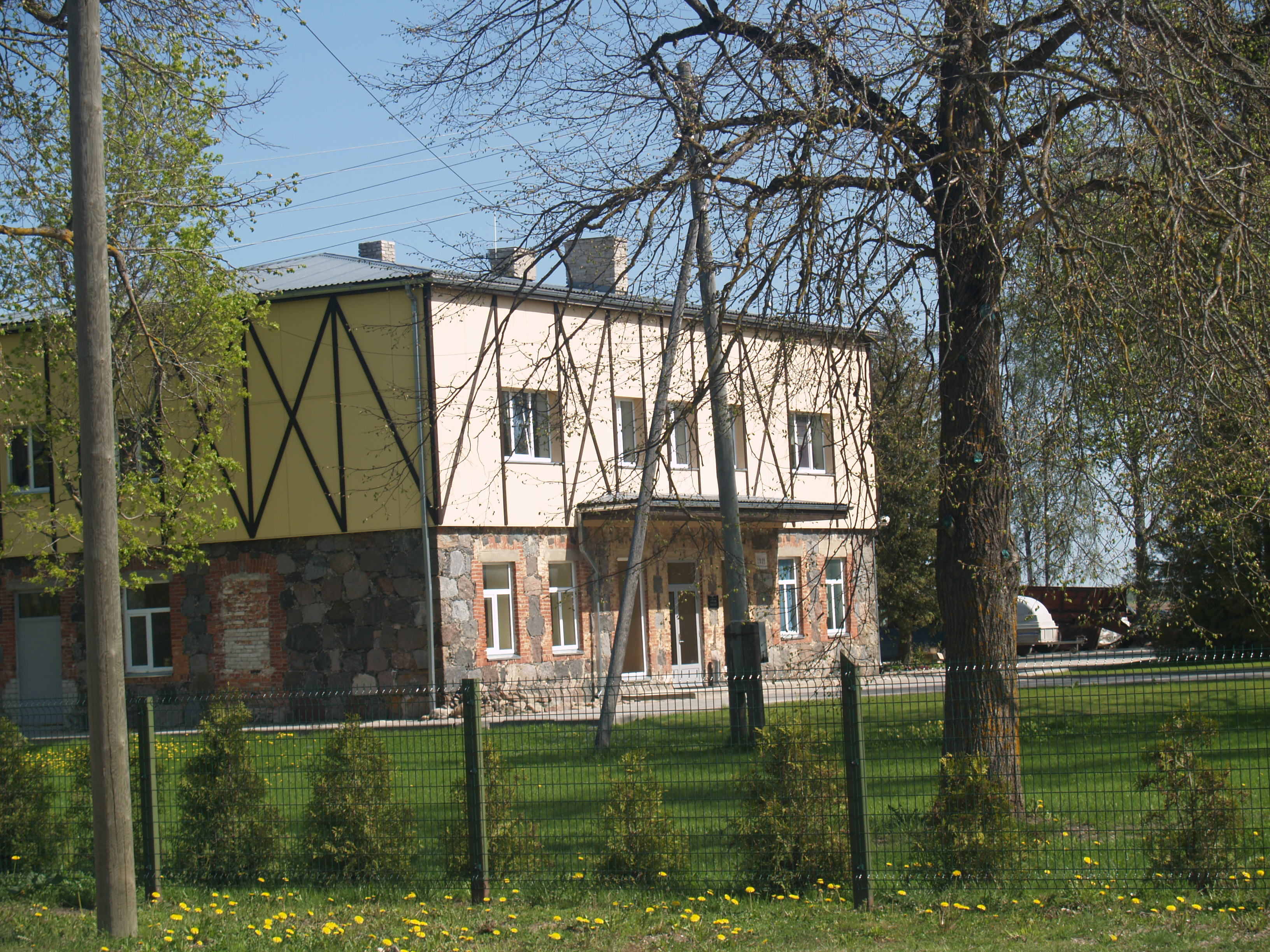 Aidu keskus Pajusi vallas